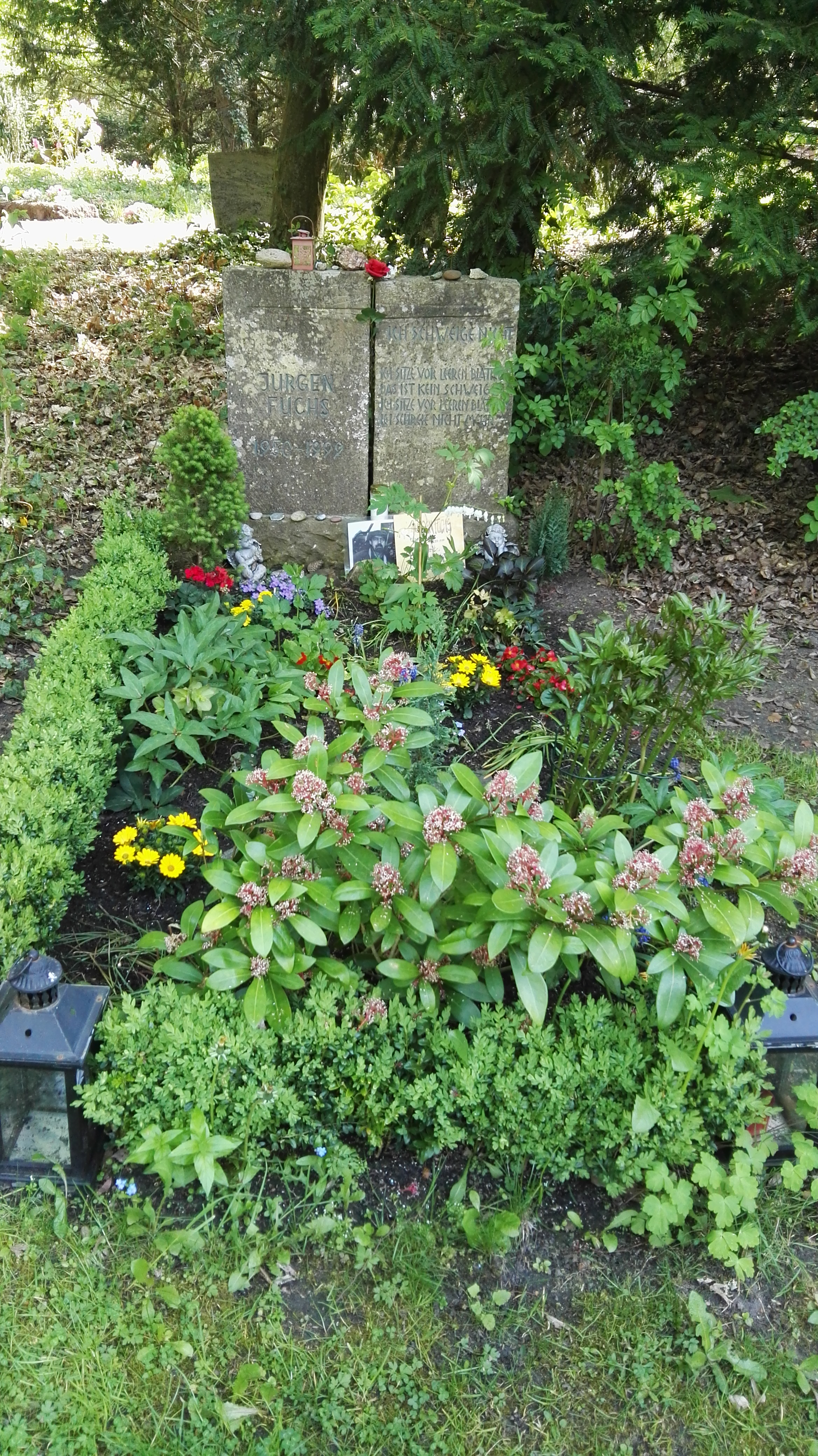 Grab von Jürgen Fuchs auf dem Heidefriedhof in Berlin